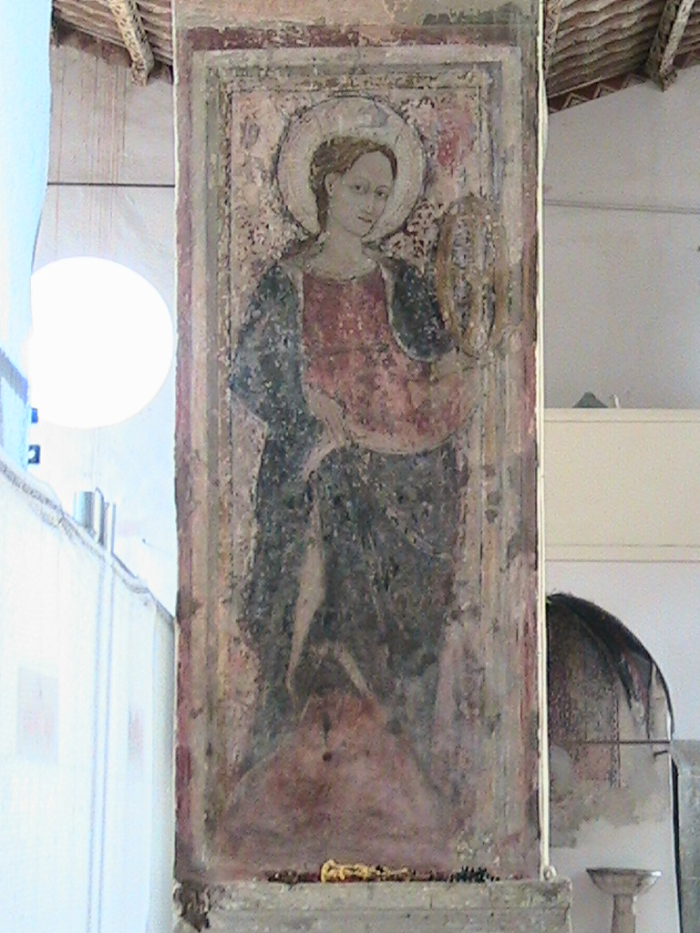 Campli - San Giovanni Battista - affreschi